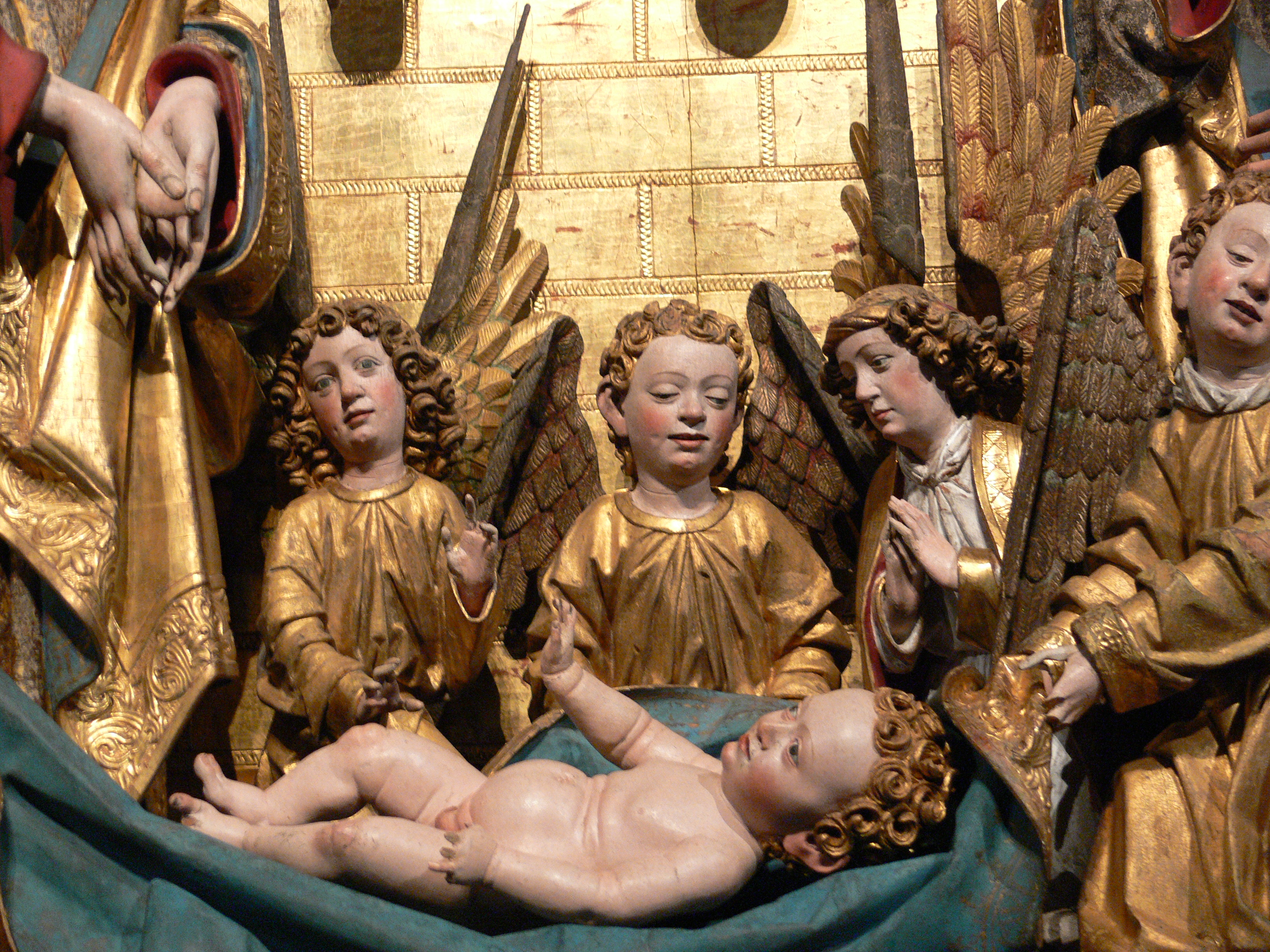 Traminer Altar von Hans Klocker und Werkstatt, Brixen, ca. 1485/1490 Zirbel- und Fichtenholz, originale Fassung, umfassend restauriert 2003-2008 Bayerisches Nationalmuseum, Inv. MA 1952 (bis 1845 Pfarrkirche Tramin; 1856/1857 aus der Sammlung Max Ainmiller erworben) Jesuskind und Engel